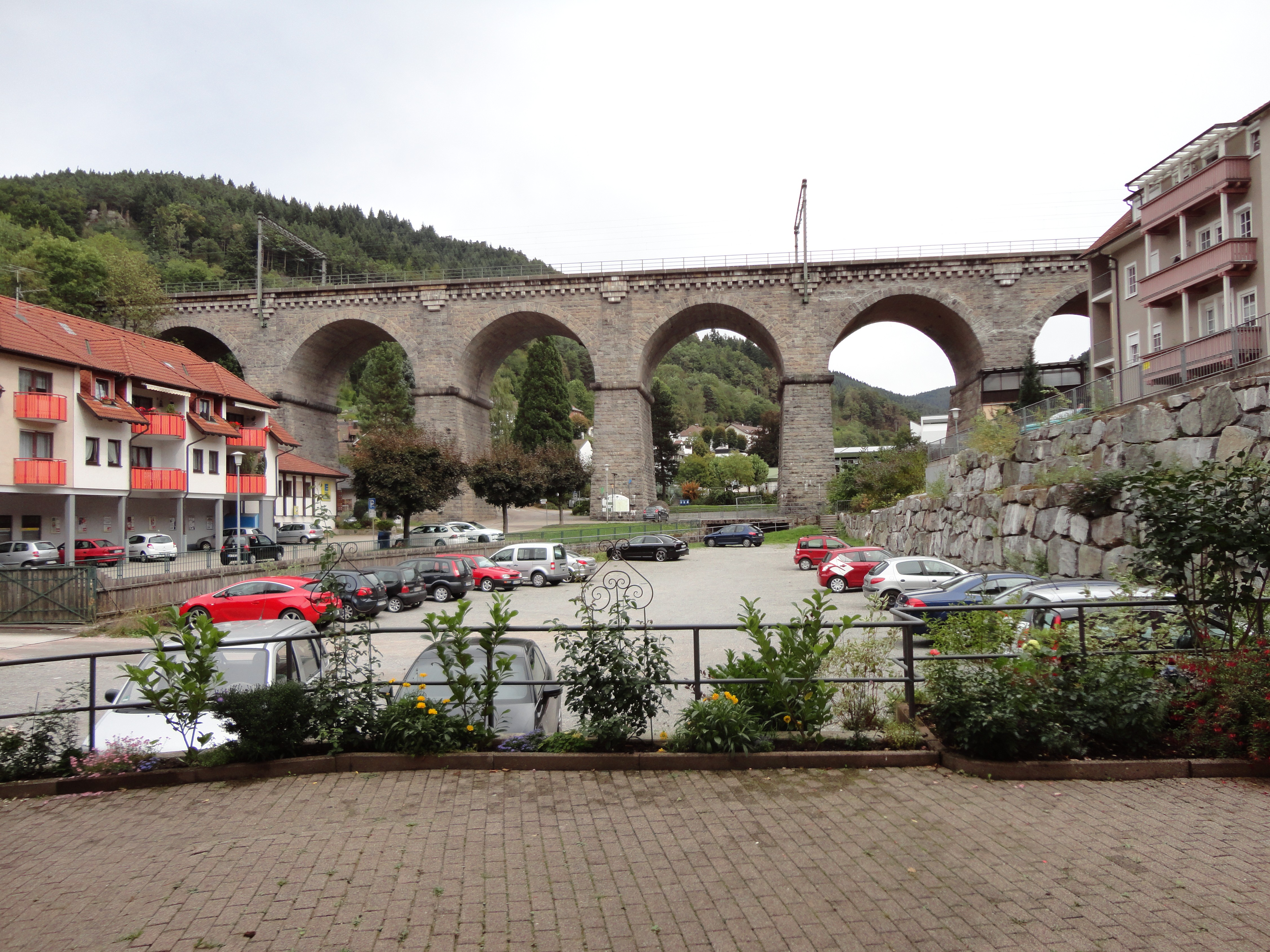 Eisenbahnviadukt Hornberg im Schwarzwald, von Westen aus gesehen.